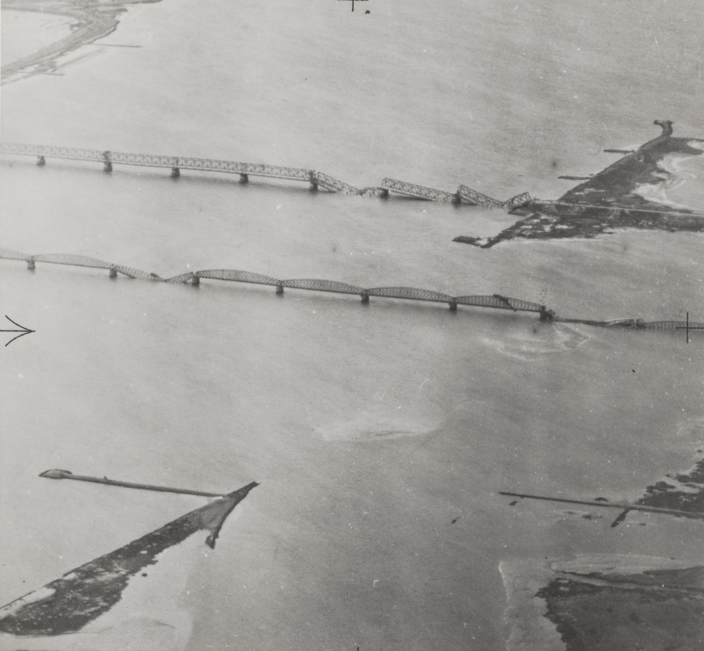 Luchtopname. Moerdijkbruggen na het springen door de Duitsers